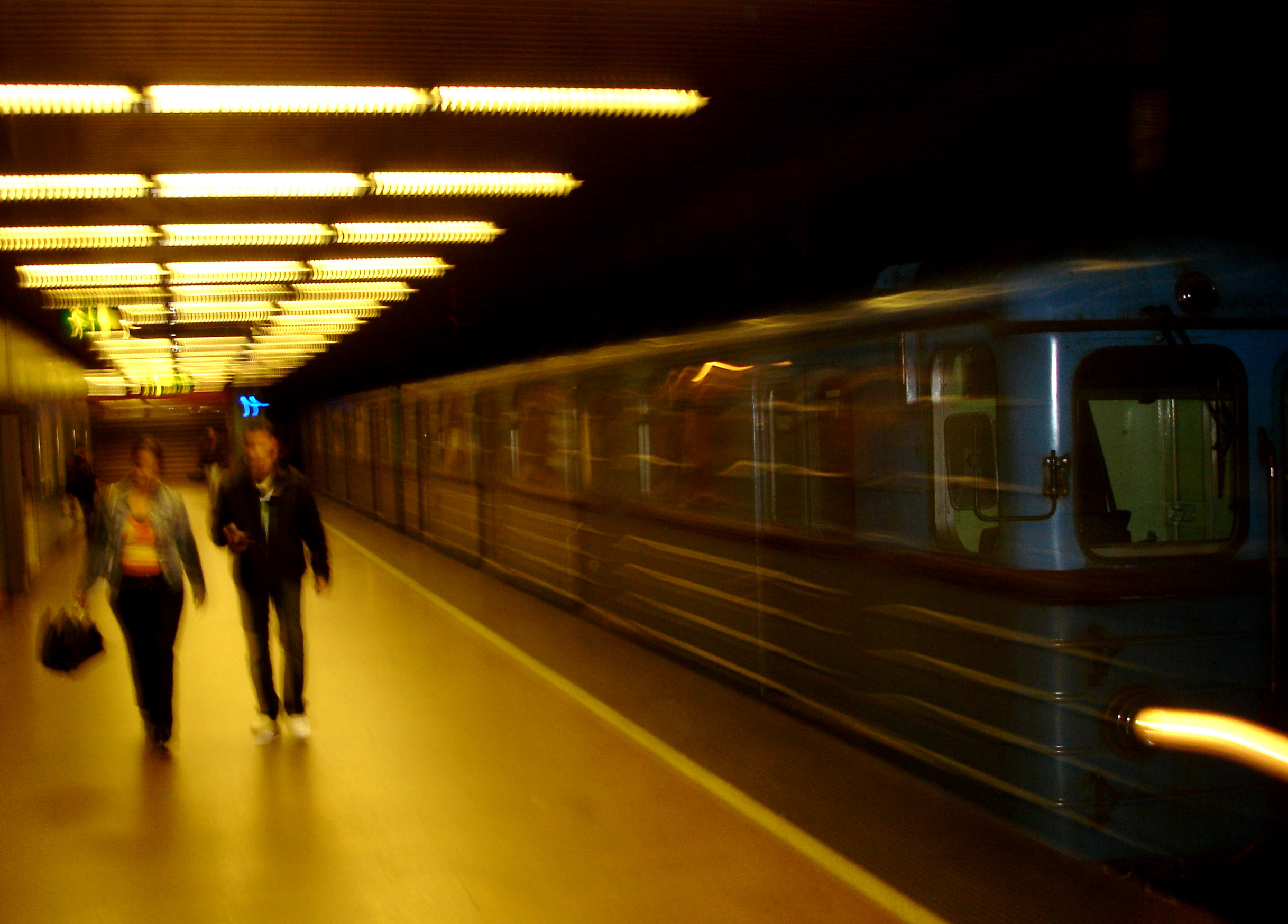 Népliget (Budapest Metro)